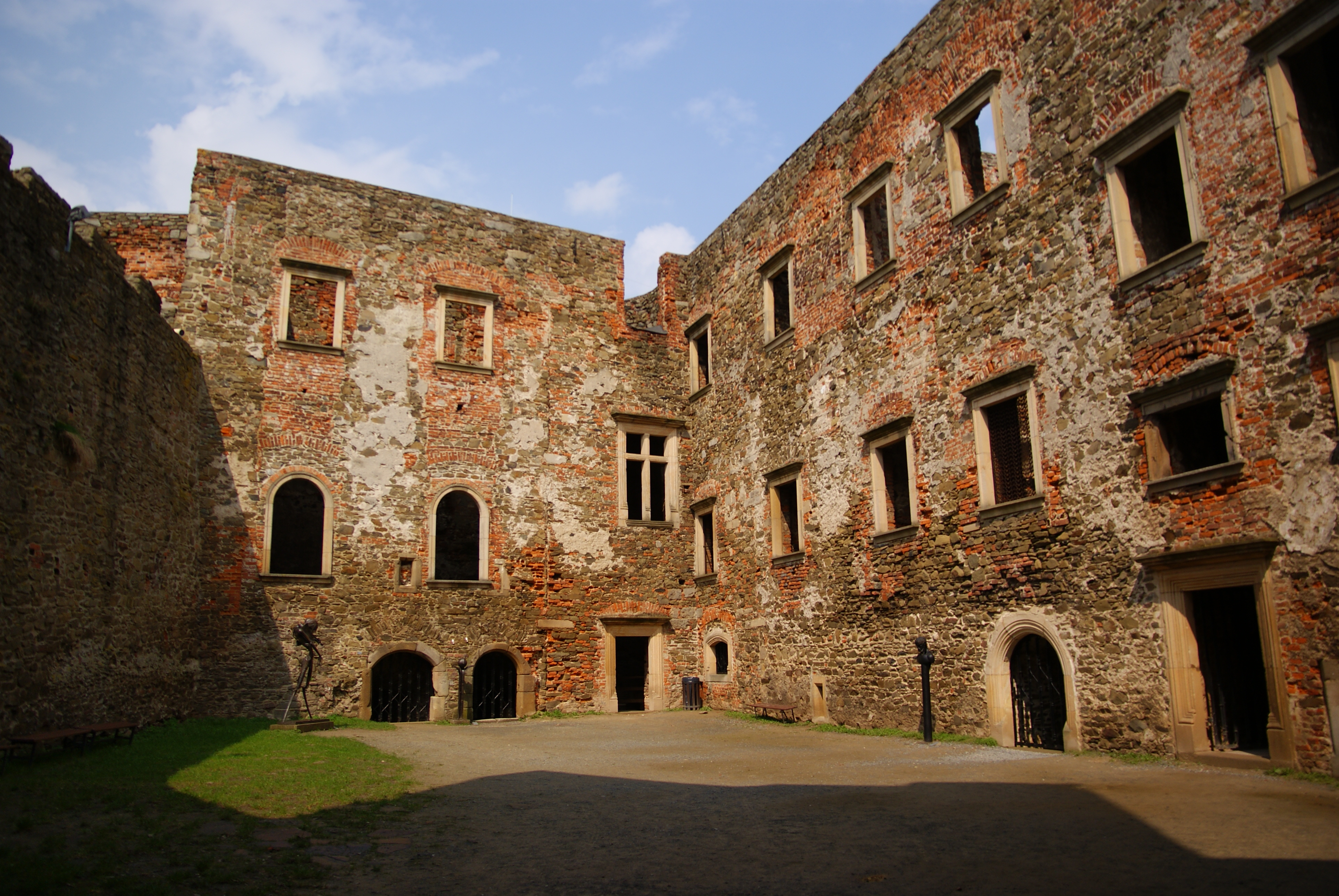 Hrad Helfštýn, zřícenina (Týn nad Bečvou), Týn nad Bečvou